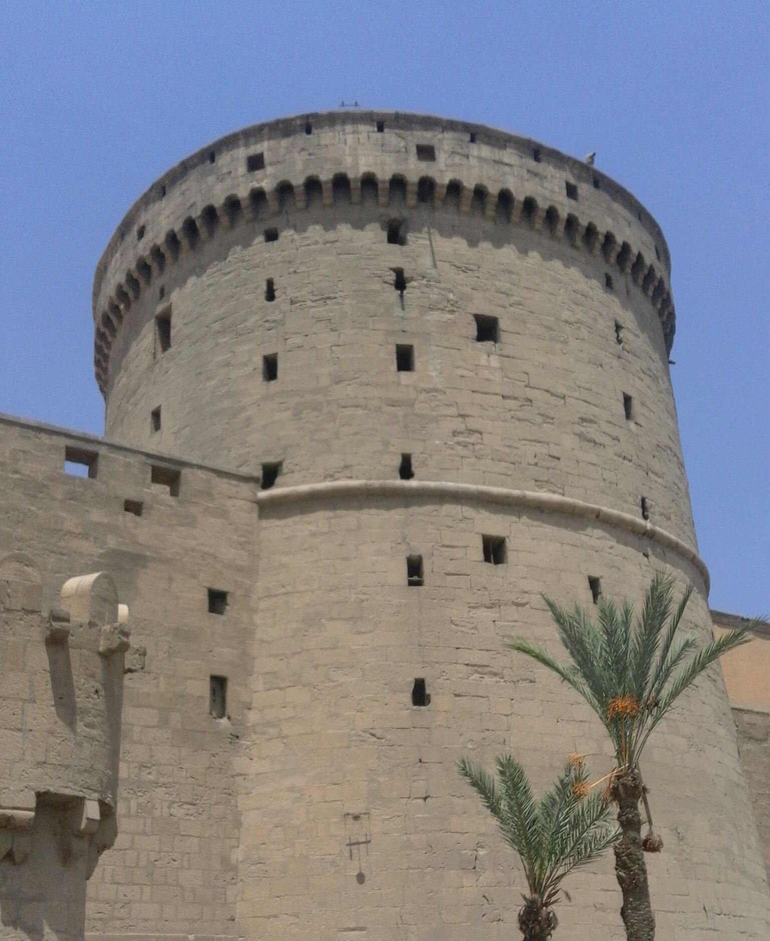 صورة لأحد أبراج قلعة صلاح الدين الأيوبي